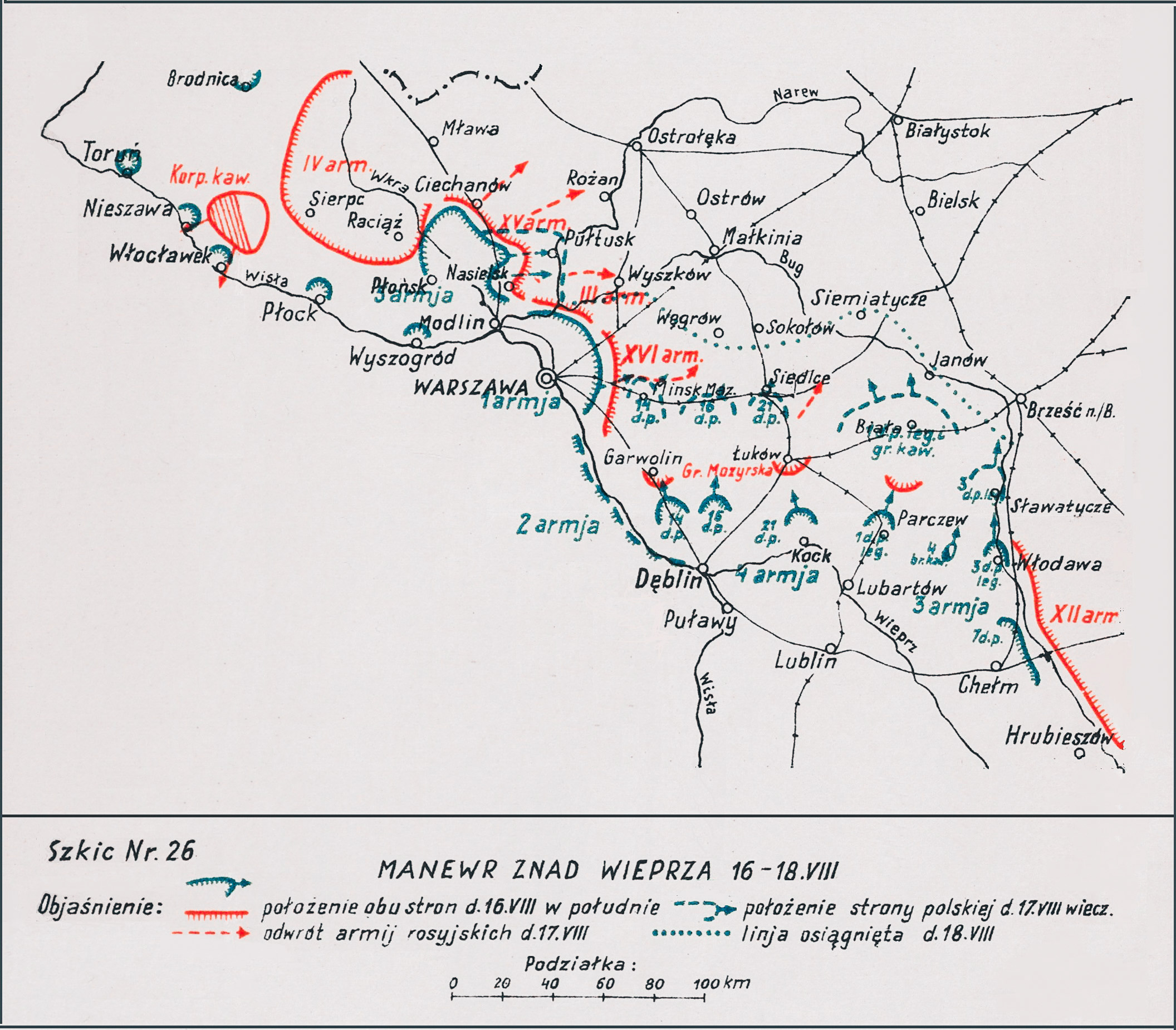 Manewr znad Wieprza 16 – 18 sierpnia 1920. Adam Przybylski, Wojna Polska 1918 ― 1921; Szkic Nr 26.